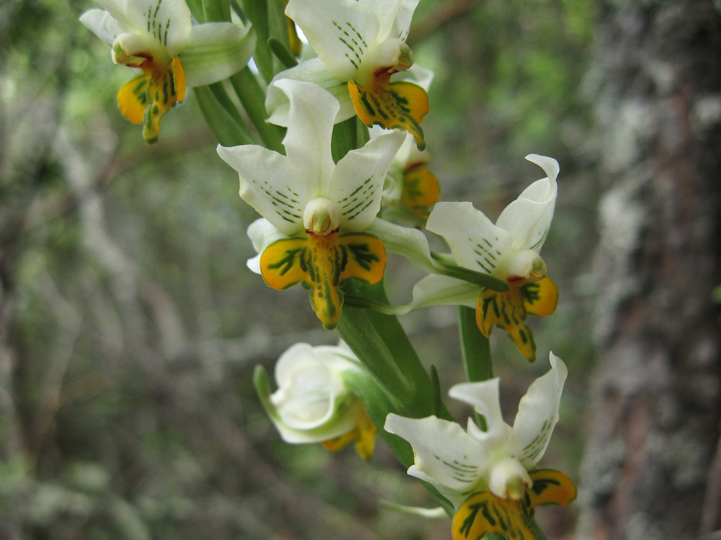 Orquídea